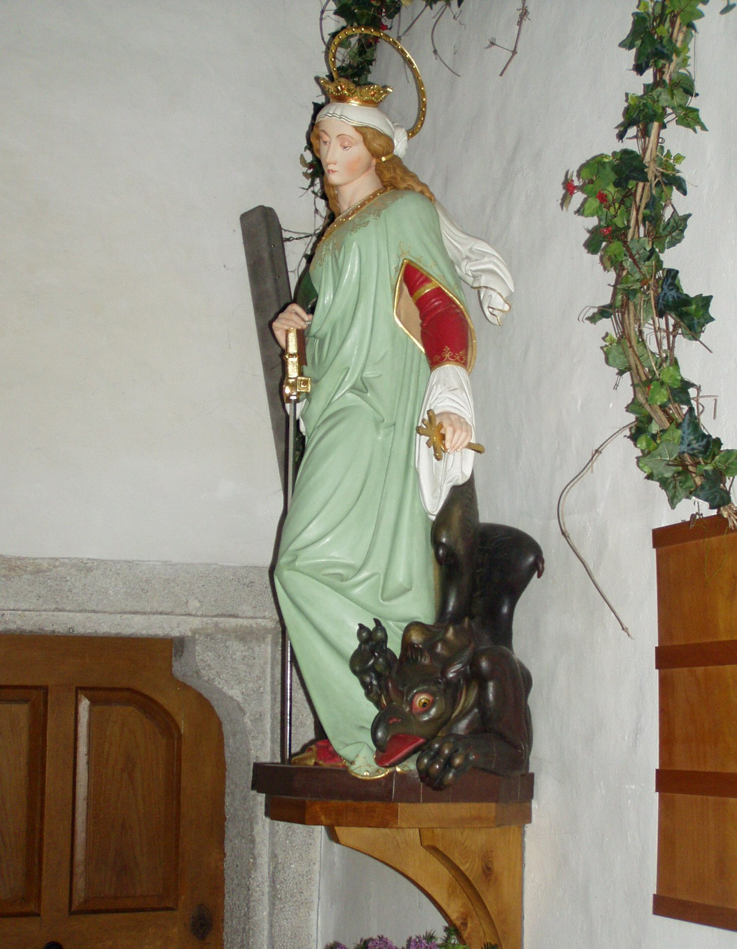 Statue Hl. Margareta in der Pfarrkirche von Sipbachzell